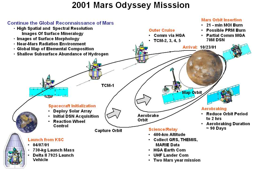 Etapas principais da trajectória da sonda 2001 Mars Odyssey até Marte